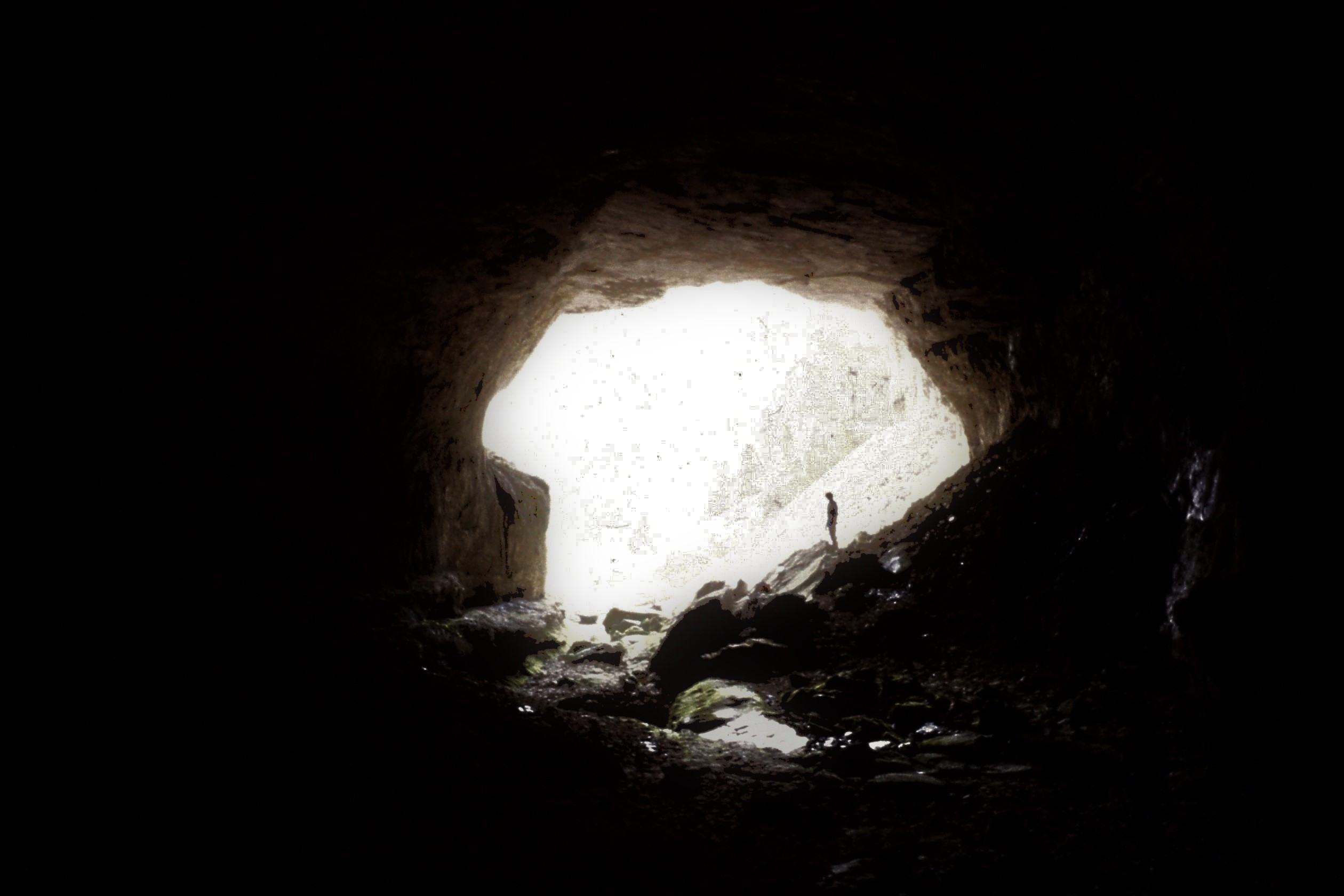 Vue depuis l'entrée de la grotte du Guiers Vif.